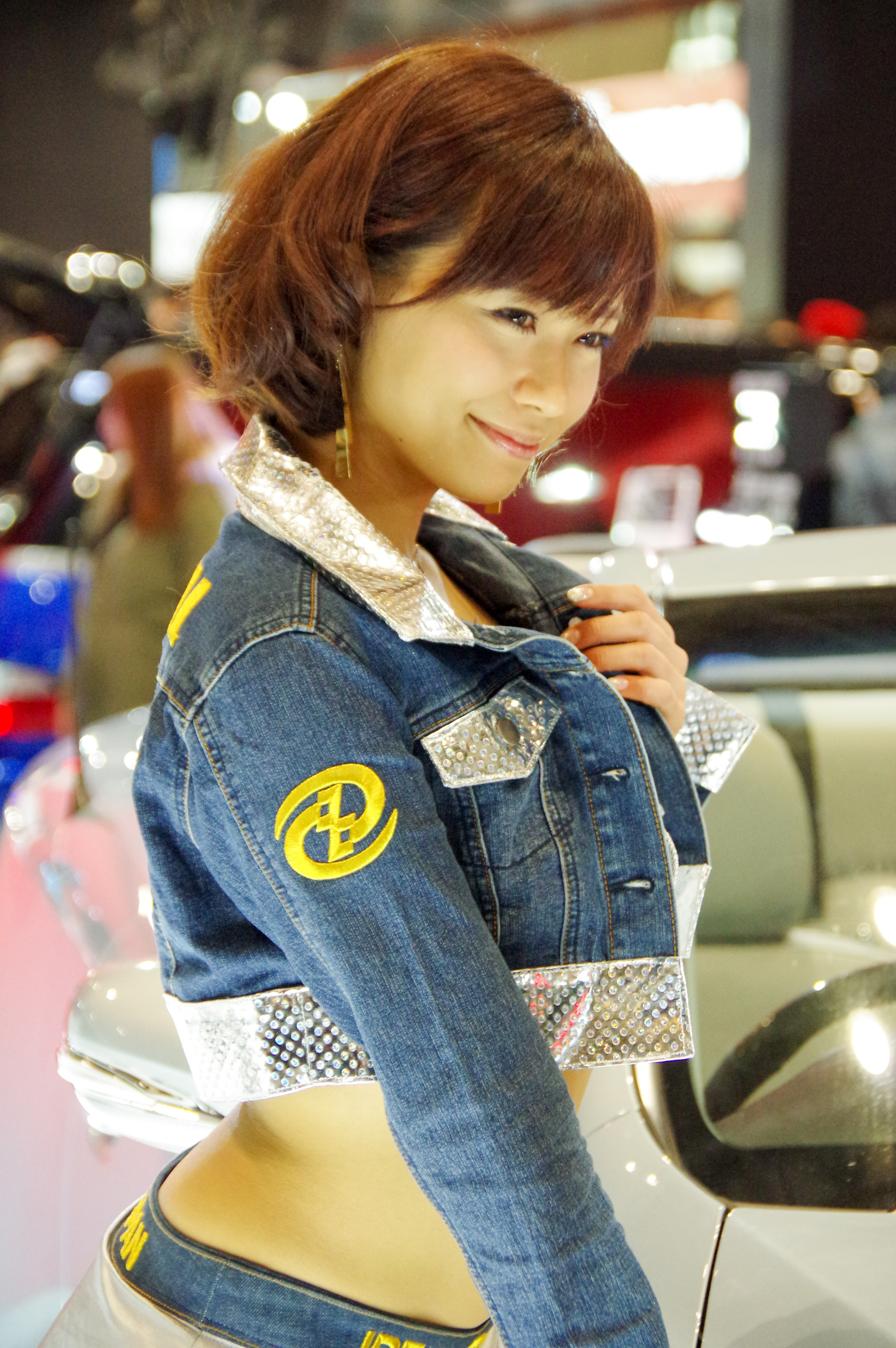 TOKYO AUTO SALON 2016 _39